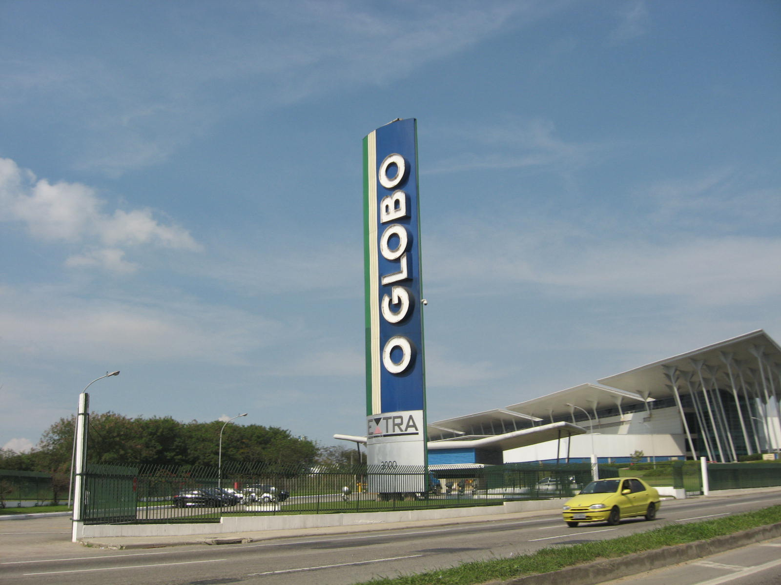 Vista do parque gráfico de O Globo, em Duque de Caxias, estado do Rio de Janeiro, Brasil.